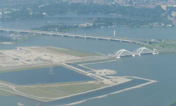 IJburg met IJbrug, eigen (lucht)foto Categorie:Afbeelding Amsterdam Amsterdam Ijburg